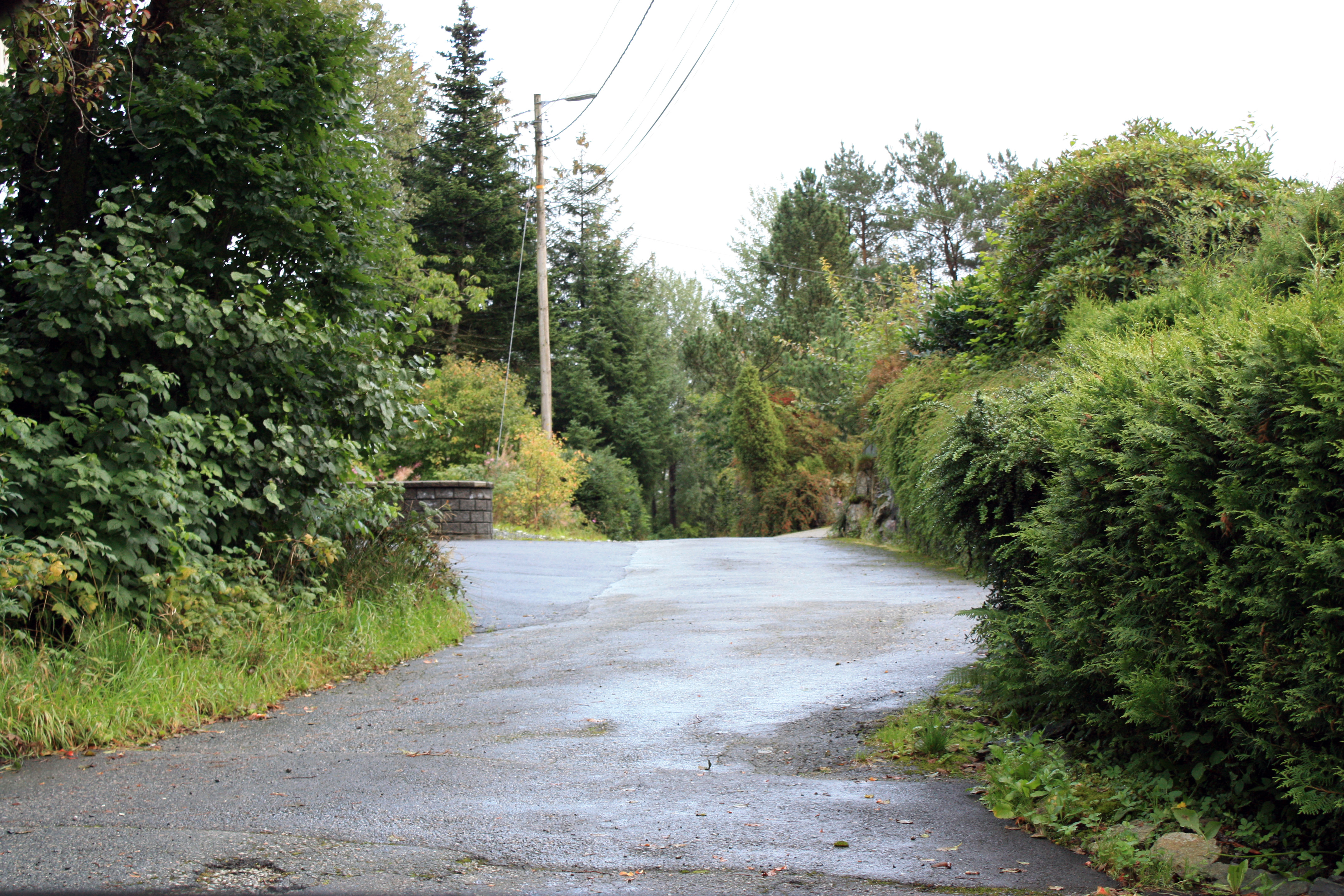 Sørhaugen, Fana, Bergen.